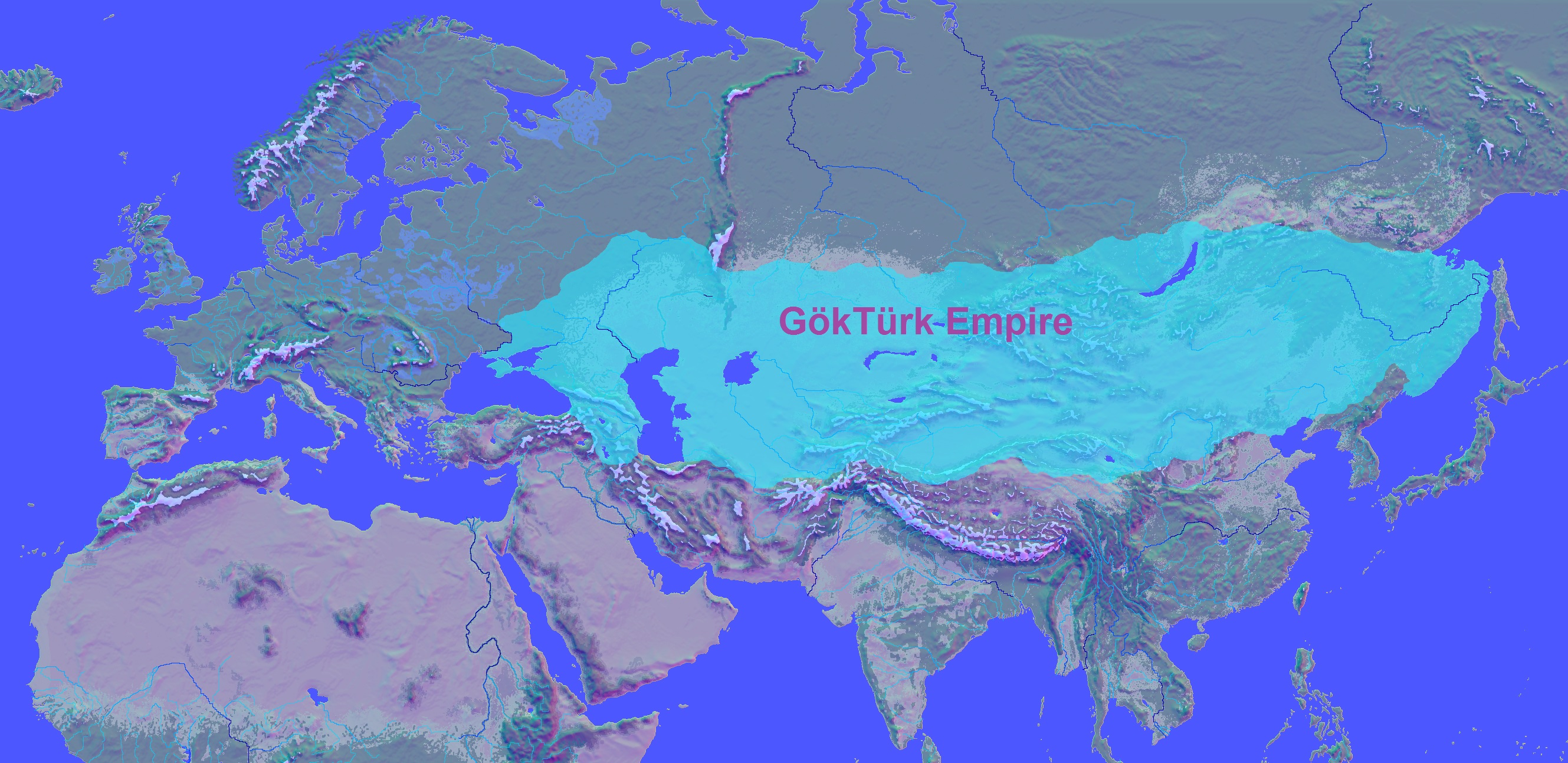 GökTürk İmperyasının ən geniş dövrü